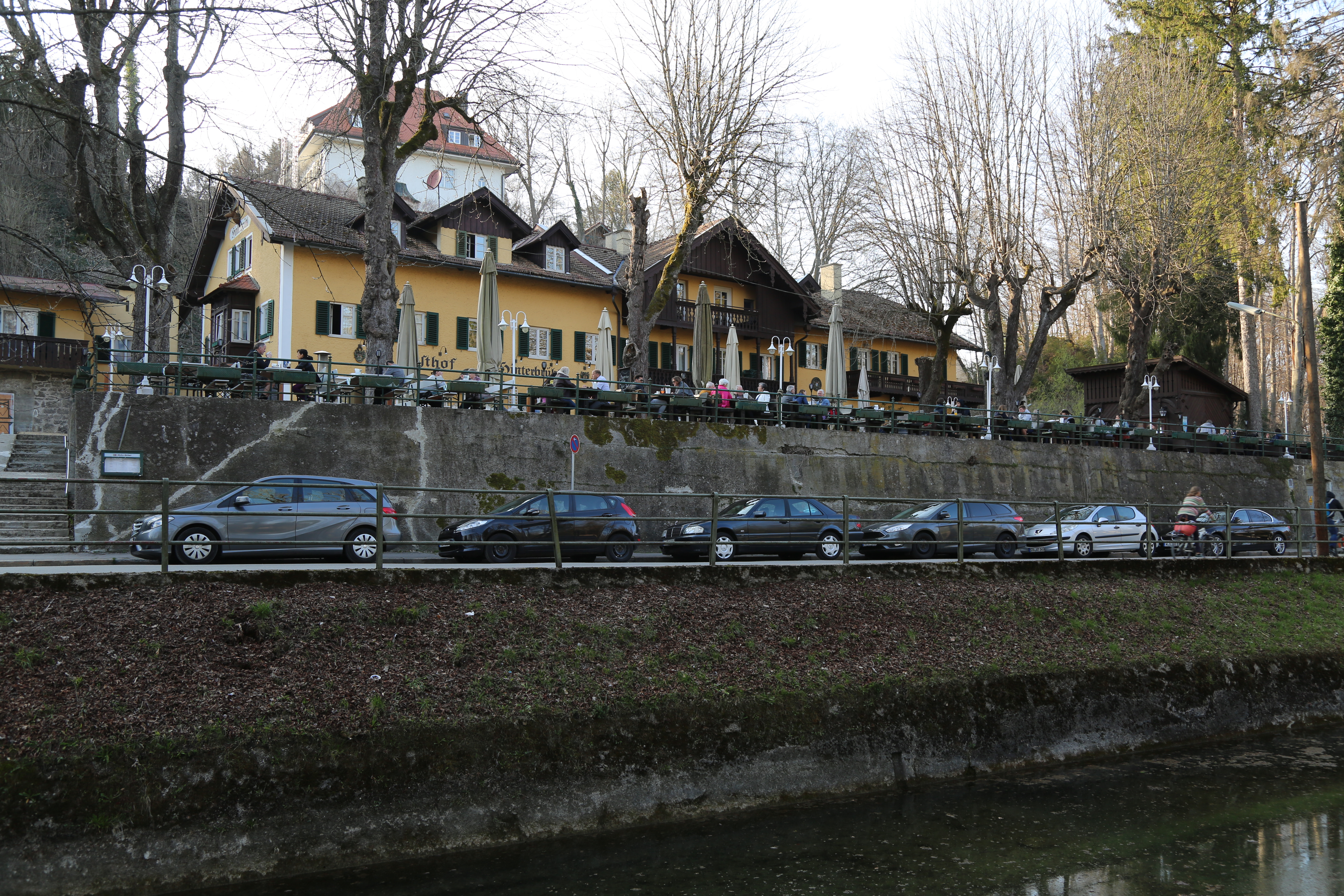 Gasthof Hinterbrühl, im Münchner Stadtteil Thalkirchen